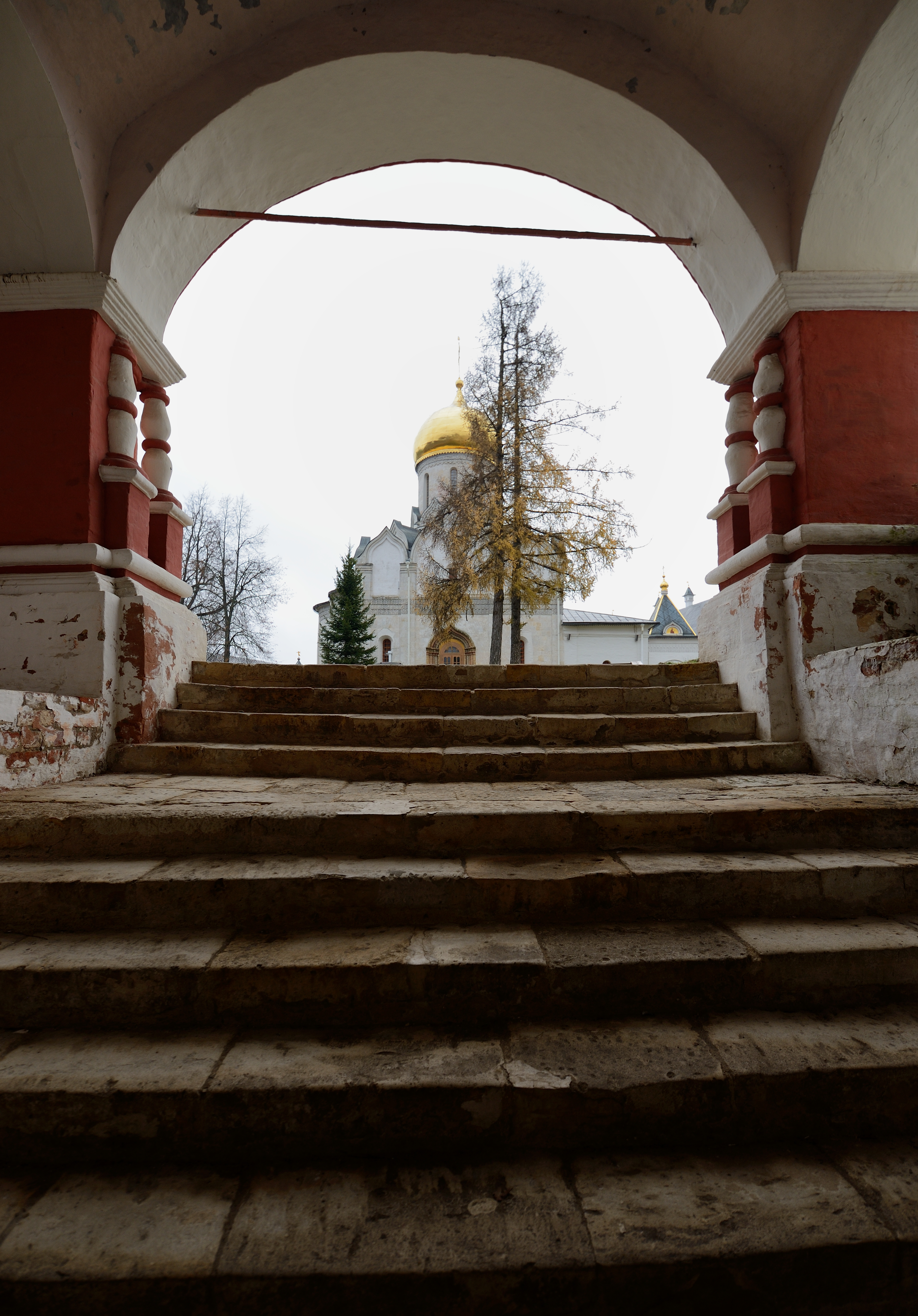 Вид на Собор Рождества Пресвятой Богородицы Саввино-Сторожевского Ставропигиального мужского монастыря с парадной лестницы, расположенной в подклете надвратной церкви